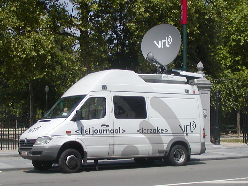 Mercedes-Benz Sprinter van het VRT-nieuws, Brussel, 2003. Eigen foto.